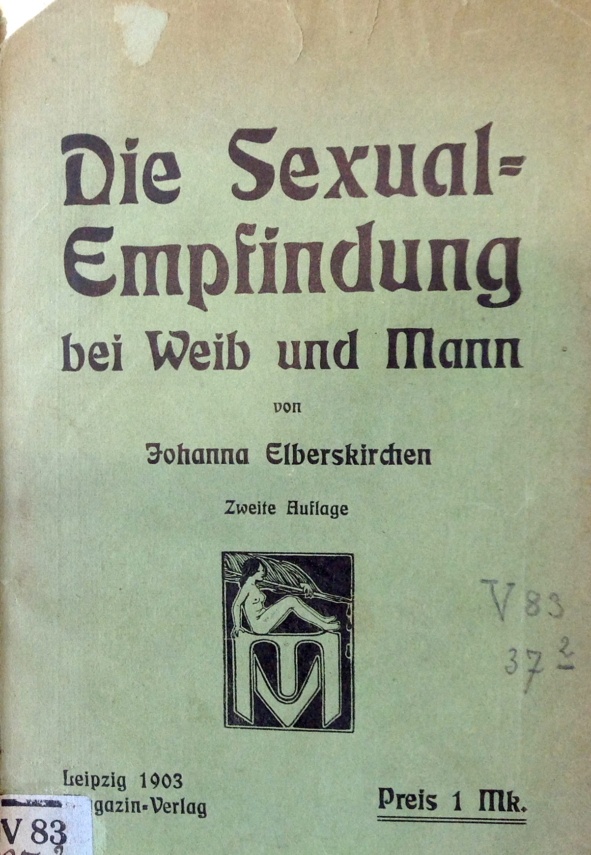 Deckblatt des Essays der Frauenrechtlerin und Sexualaufklärerin Johanna Elberskirchen: Die Sexualempfindung bei Weib und Mann. 1903.